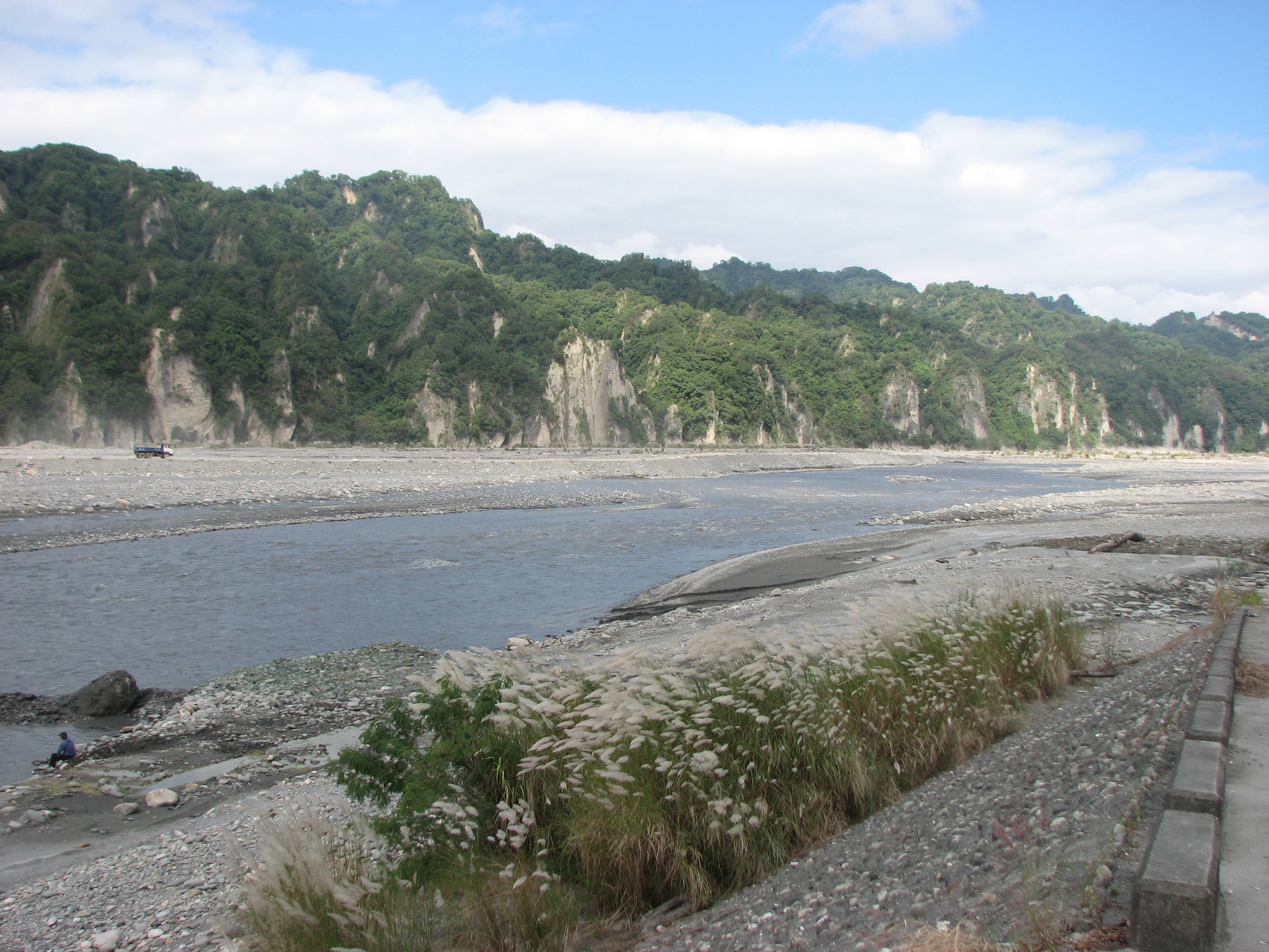 台灣台東縣卑南溪與小黃山